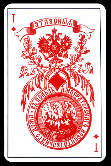 Атласная колода экстра туз